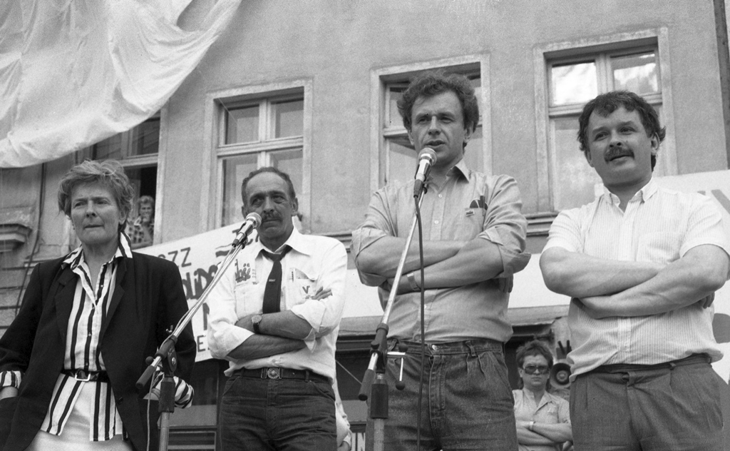 Festyn wyborczy na rynku w Tczewie. Od lewej stoją: Olga Krzyżanowska, Roman Szymon Pawlicki, Bogdan Lis i Lech Kaczyński.